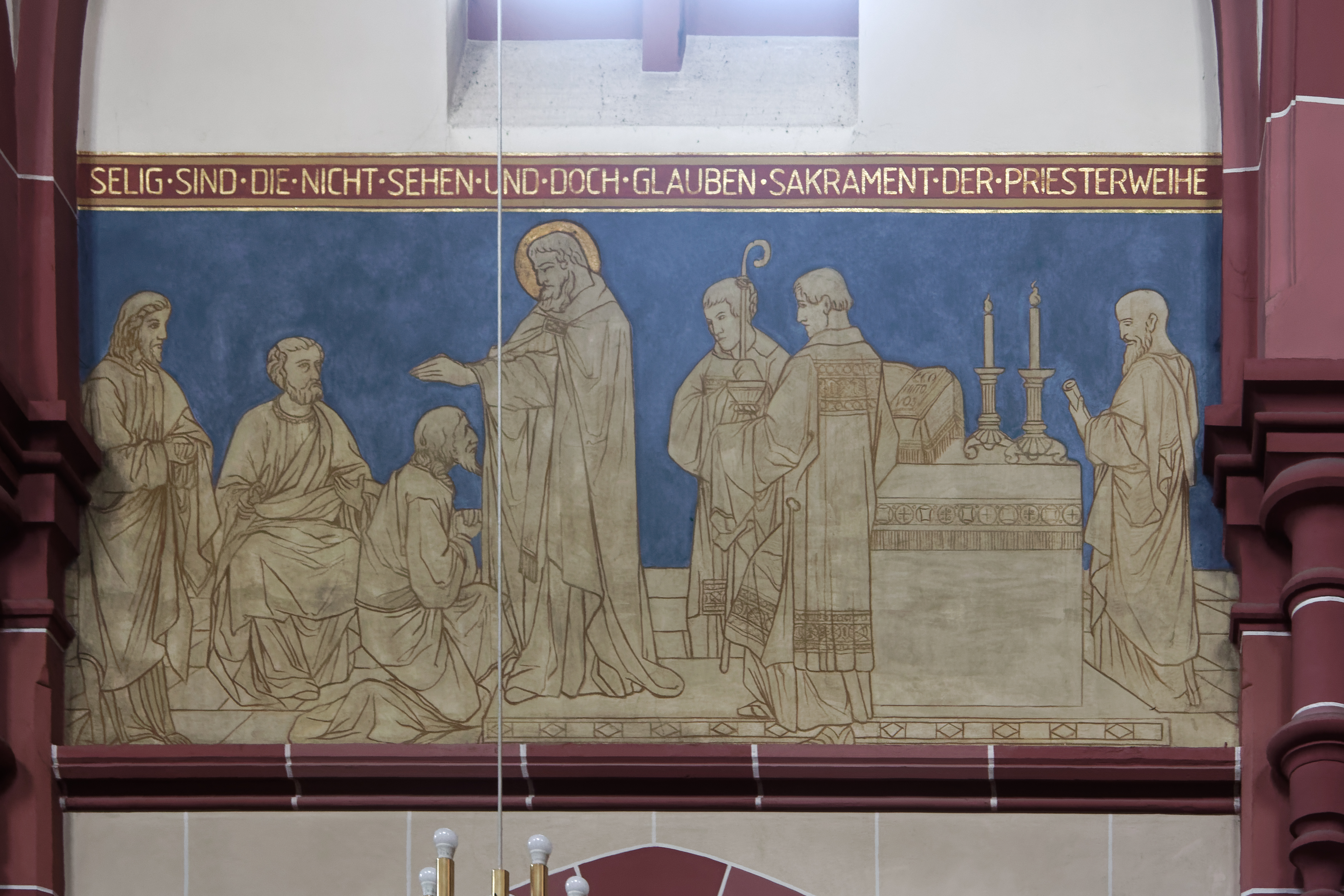 Fries der katholischen Kirche St. Nikolaus in Jügesheim (Rodgau, Hessen): "Selig sind die sehen und doch glauben Sakrament der Priesterweihe".